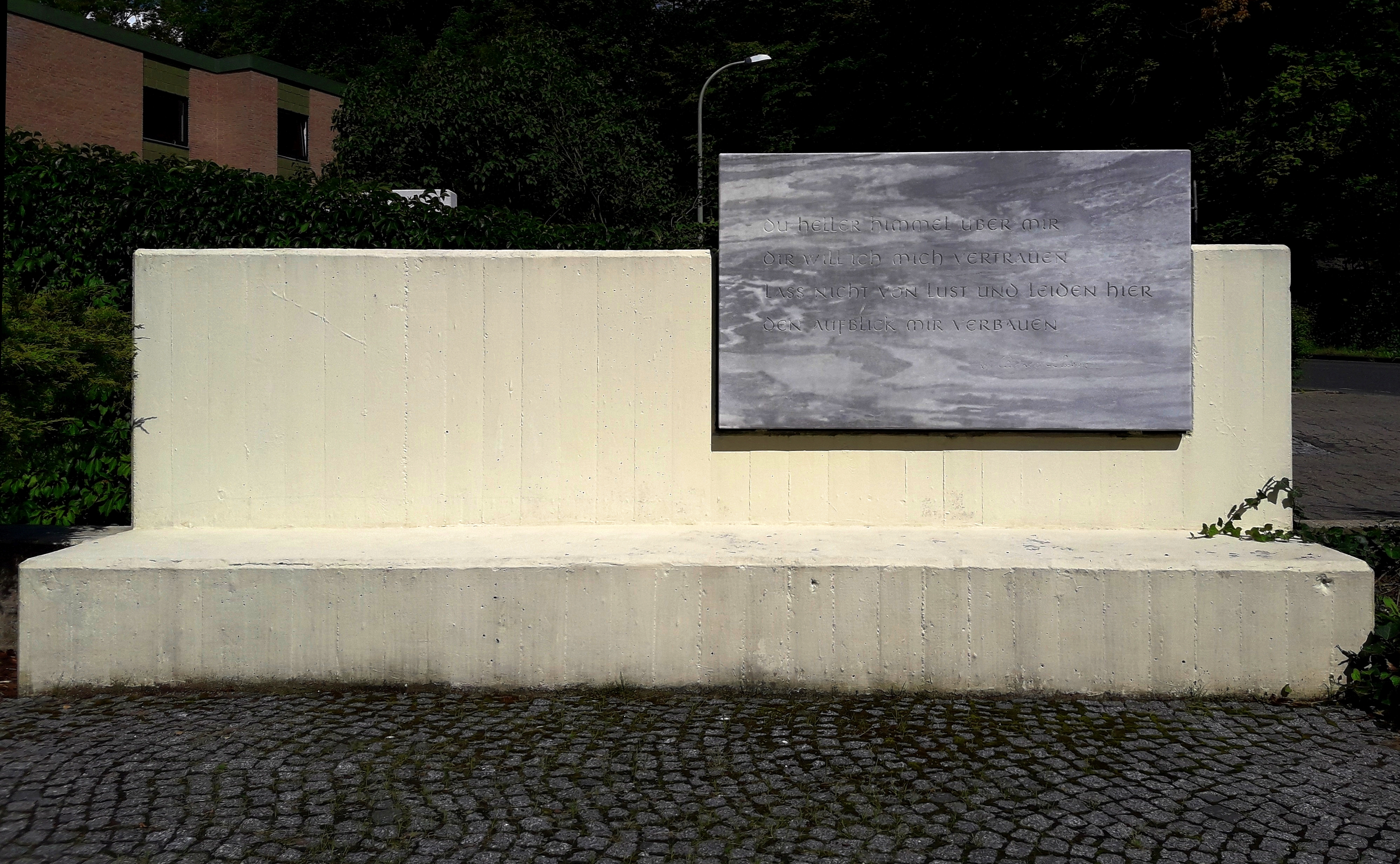 Göttingen (Herzberger Landstraße 101, 37085 Göttingen): Denkmal für Lou Andreas-Salomé